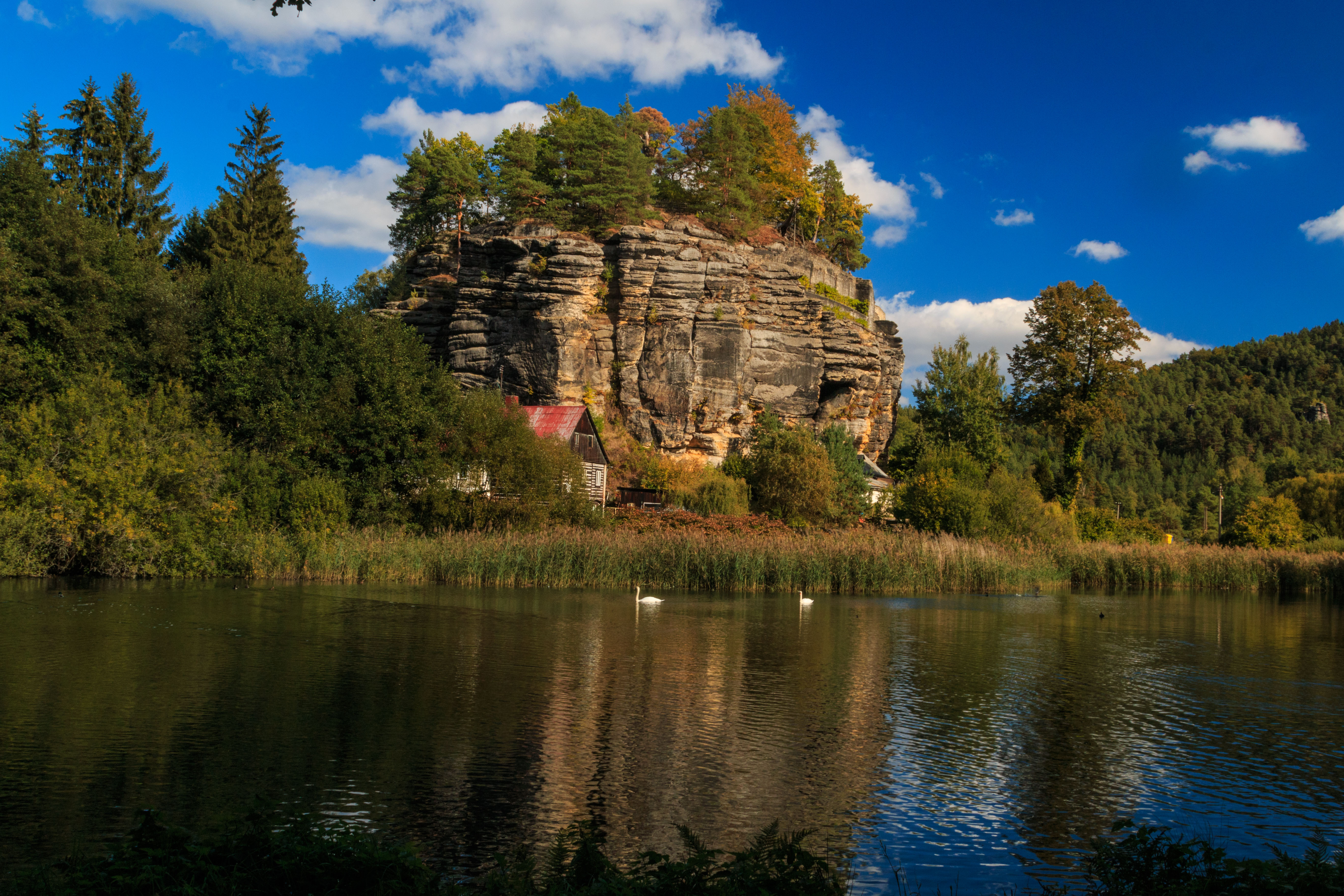 Skalní hrad ve Sloupu, Sloup v Čechách. Project: Vodstvo.